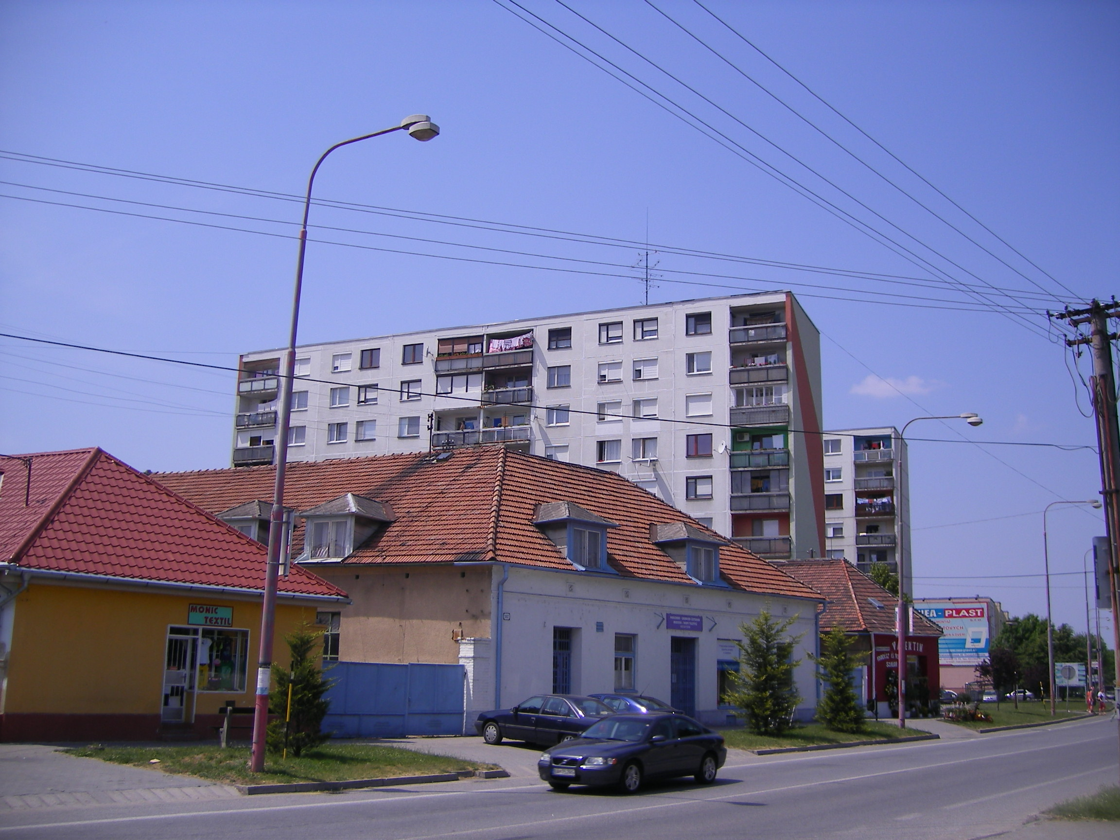 Nagymegyer - Pozsonyi utca